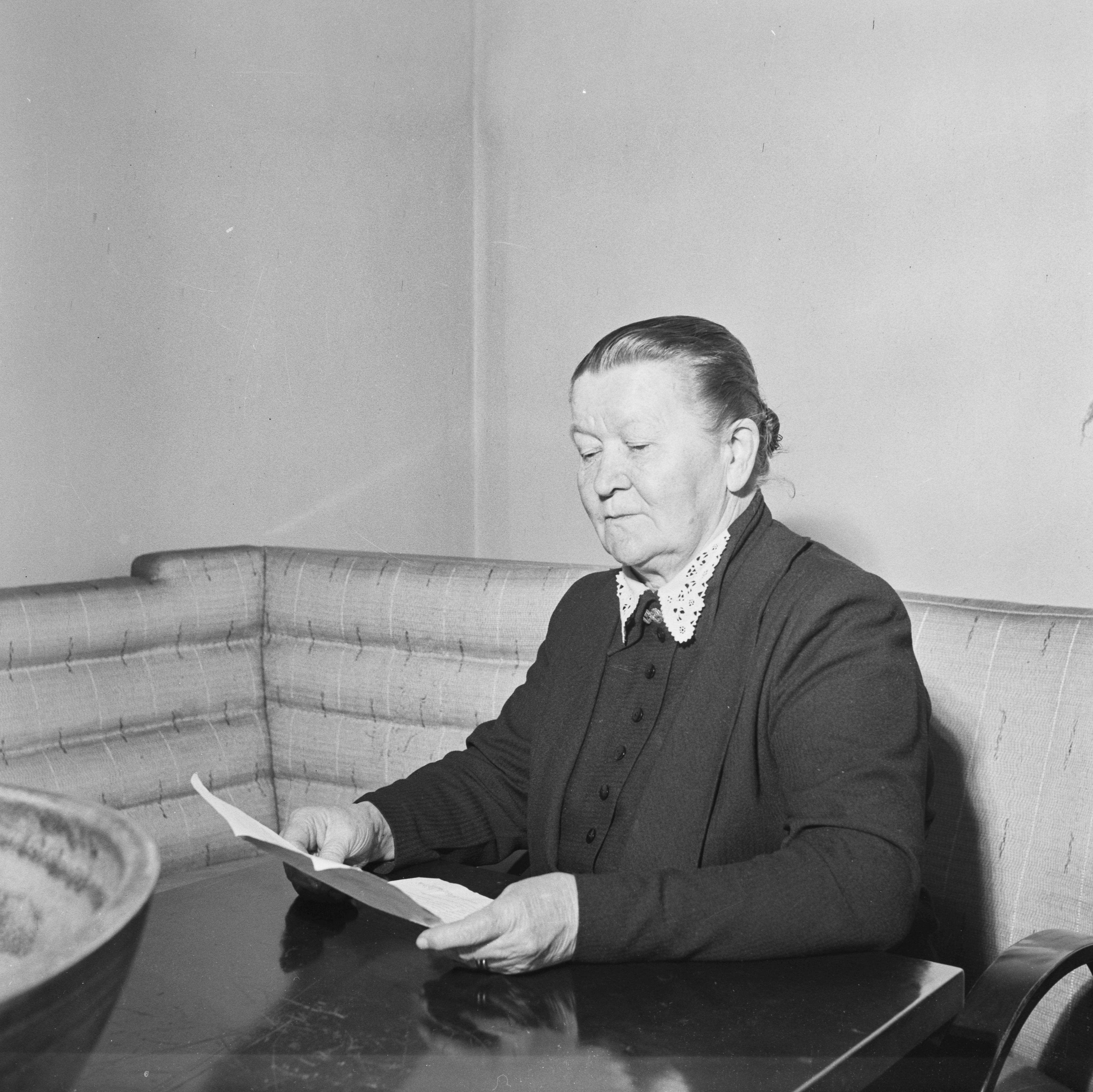 Maalaisliiton kansanedustaja Aino Luostarinen; mustavalkoinen